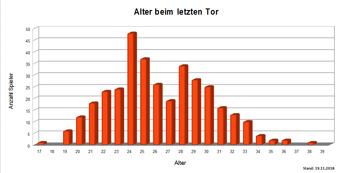 Altersverteilung der Torschützen der deutschen Fußballnationalmannschaft beim letzten Tor, Stand 19.11.2018